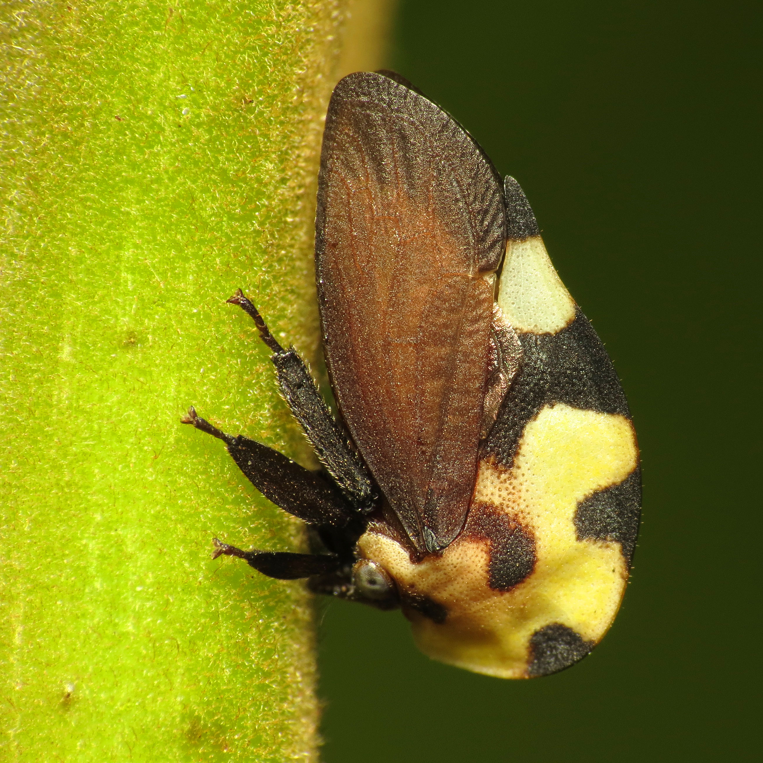 Membracis mexicana. Mérida, Yucatán, México.